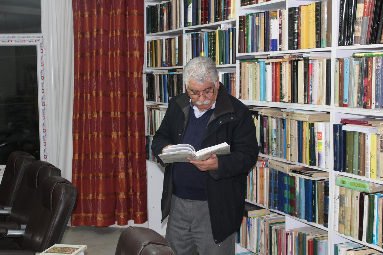 کتابخانه استاد اردشیر کشاورز